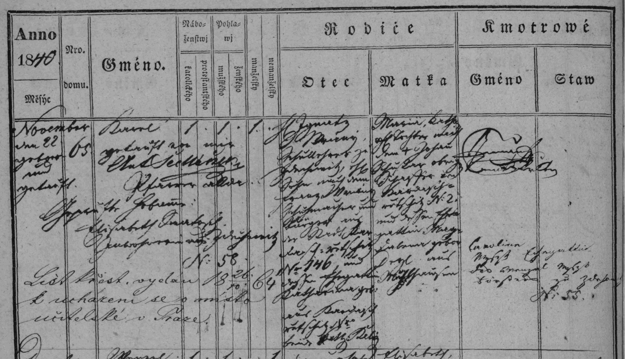 Záznam o nar. Karla Vraného, matrika N index N 1832-1843 farnost Zdechovice